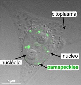 paraspeckles resaltadas con marcaxe fluorescente no núcleo dunha célula HeLa.